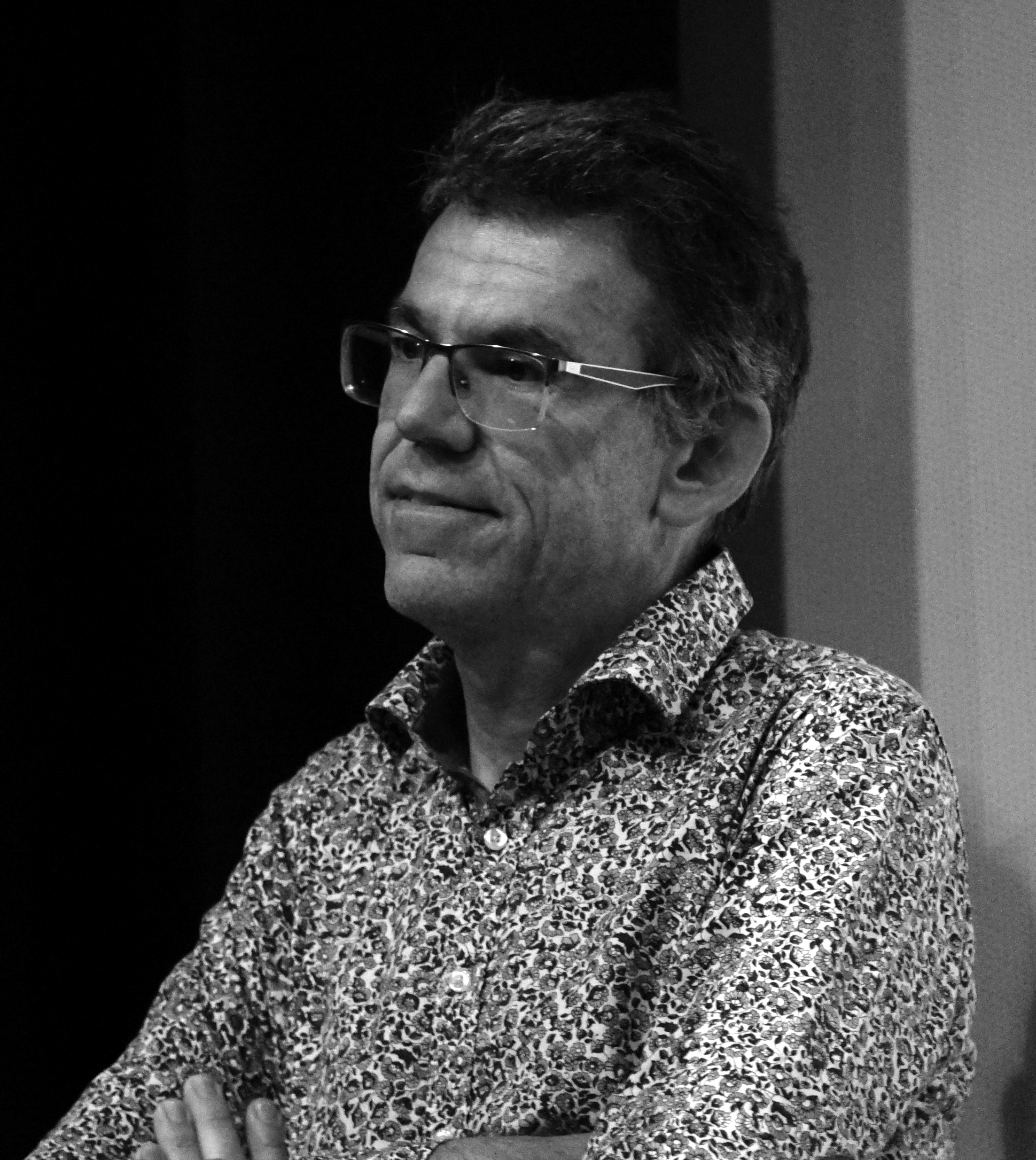 à la recherche de la IXe planète.